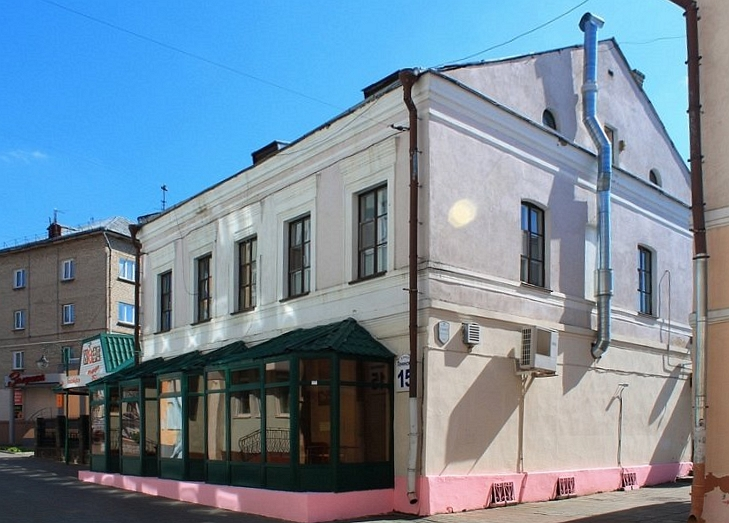 дом купца Кітаева